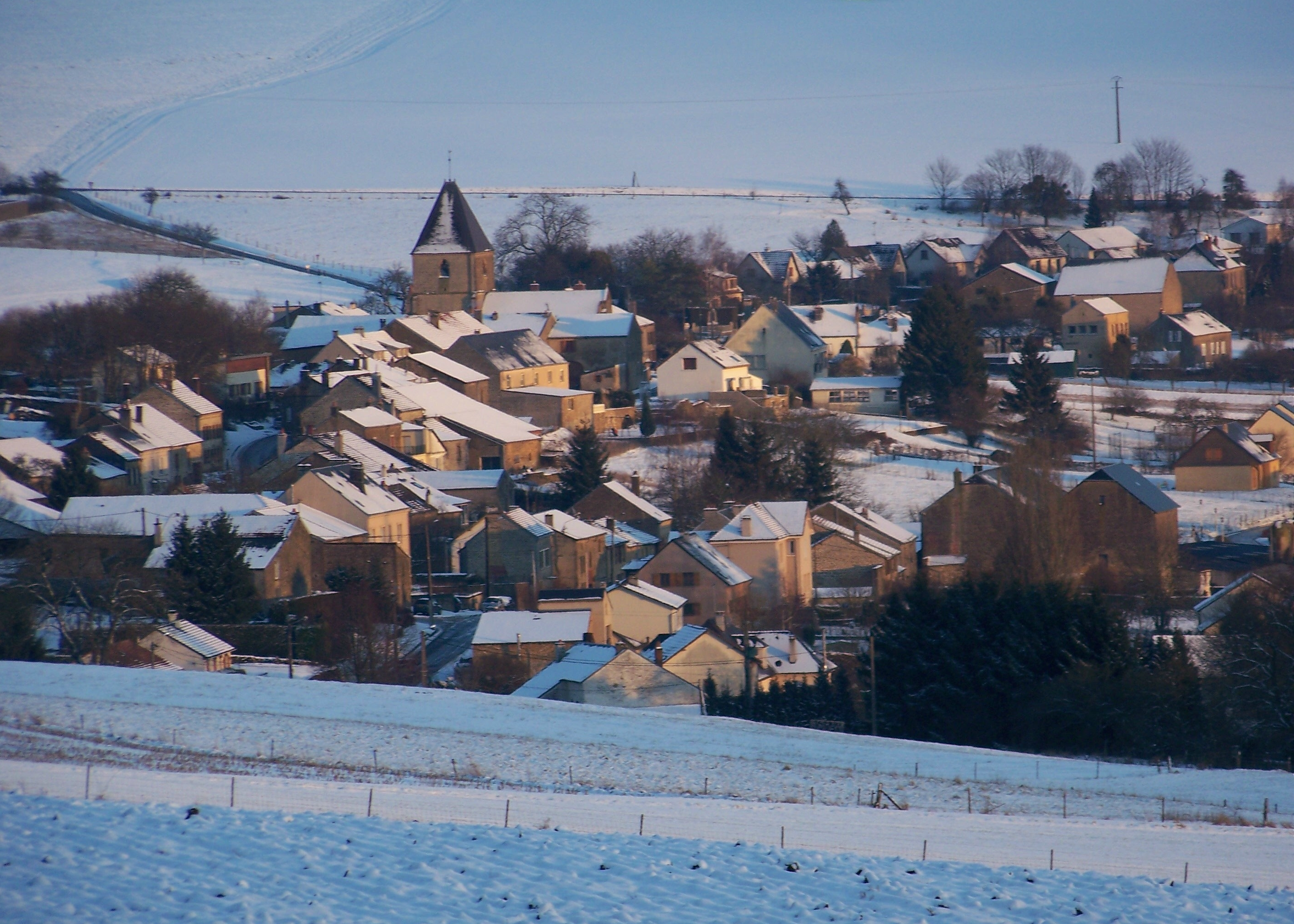 le village de Cheveuges